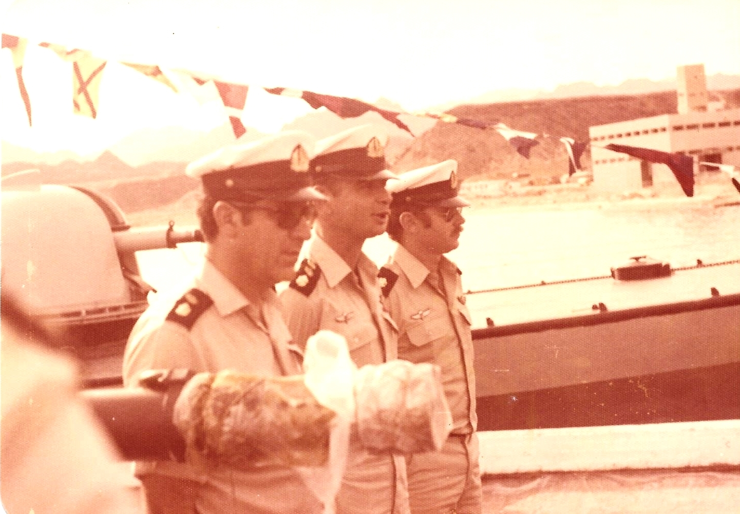 גדעון רז עם קציני ספינות הטילים 1975